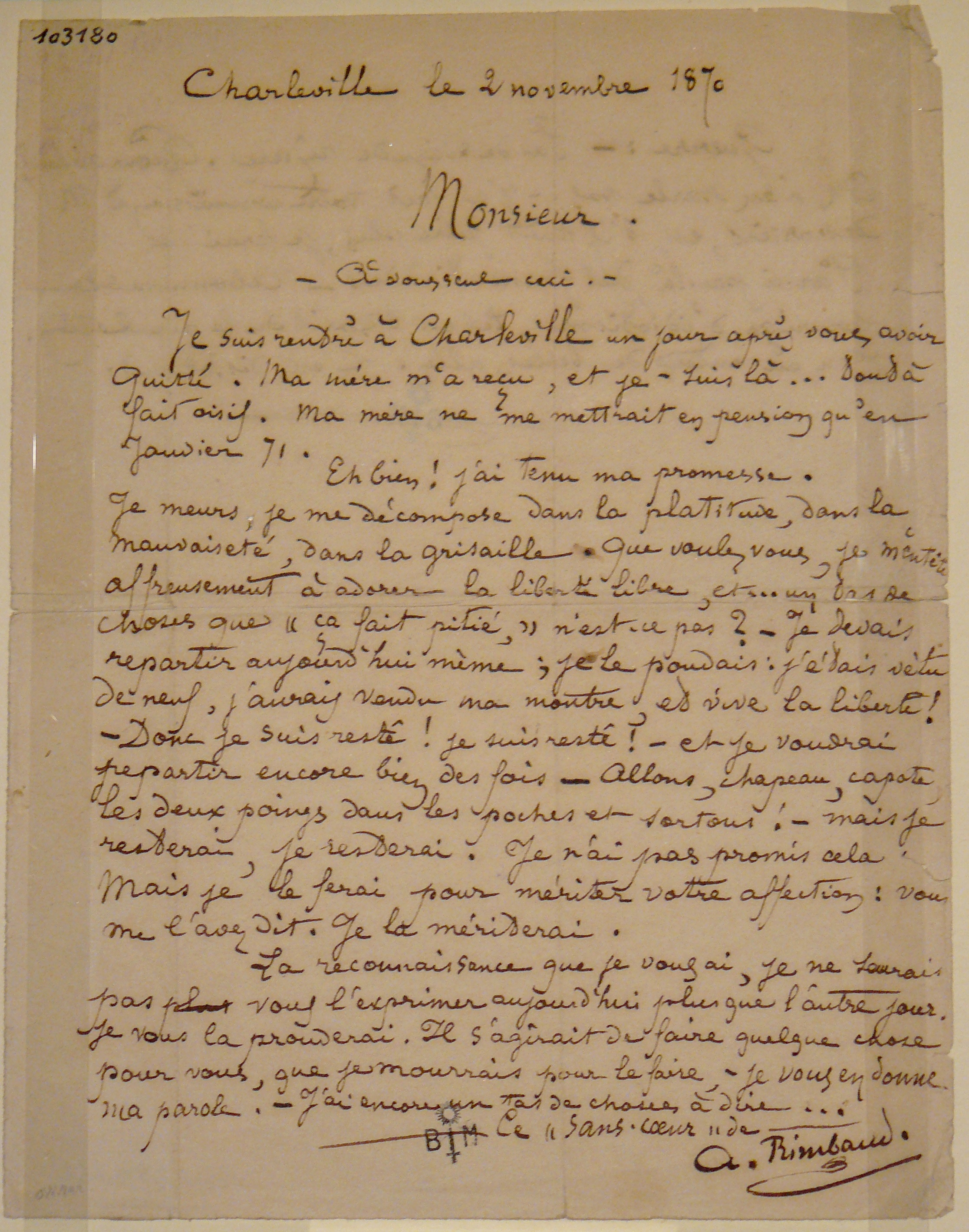 Rimbaud, lettre à son professeur Georges Izambard, 2 novembre 1870 - Musée Rimbaud Charleville-Mézières - Original photographié lors de l'exposition "Rimbaudmania", Paris